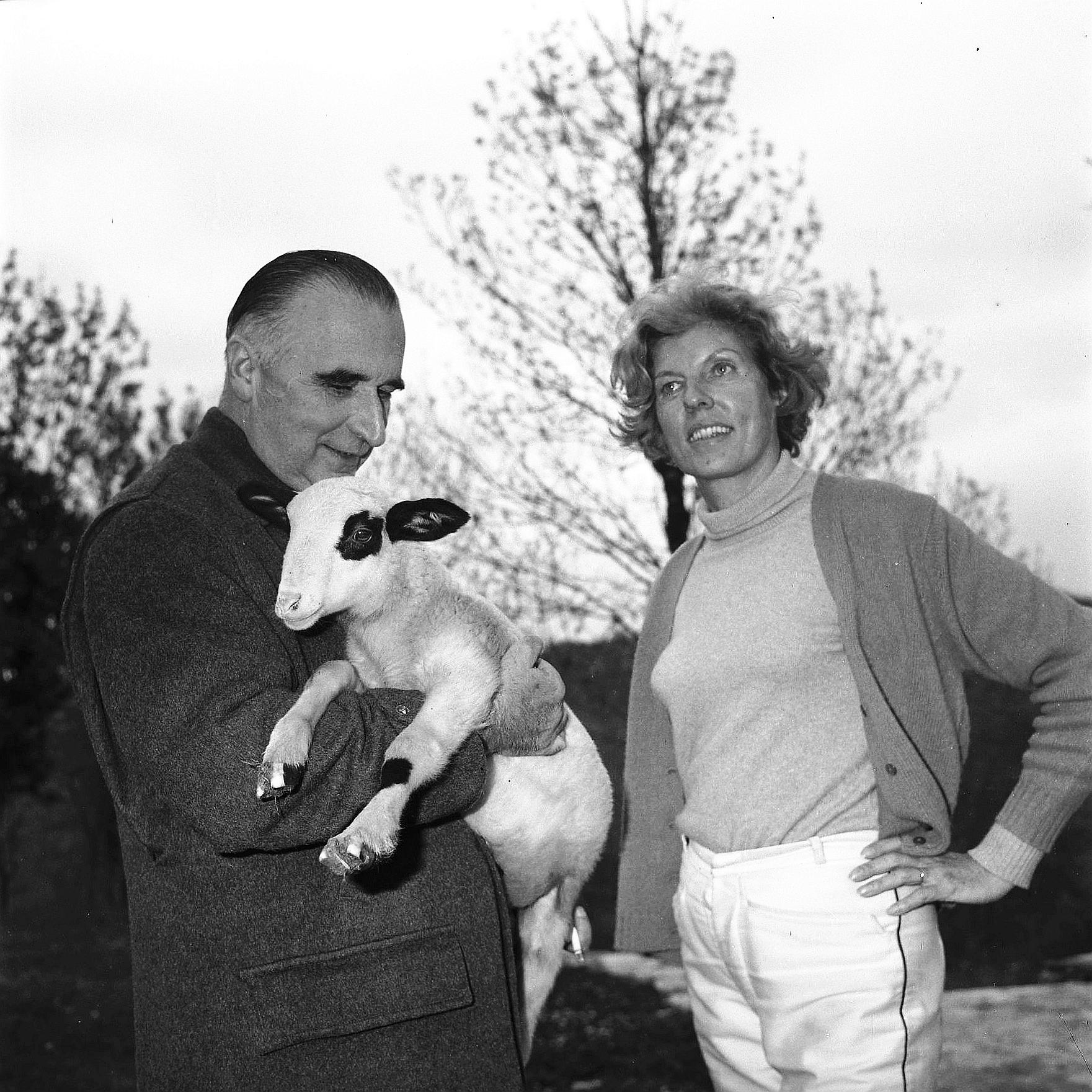 Cajarc (Lot). 17 Avril 1965. Vue de Georges Pompidou tenant une brebis dans ses bras avec sa femme à ses cotés.